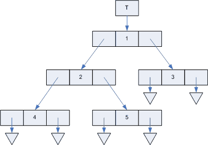 Бінарне дерево, реалізоване на вказівниках